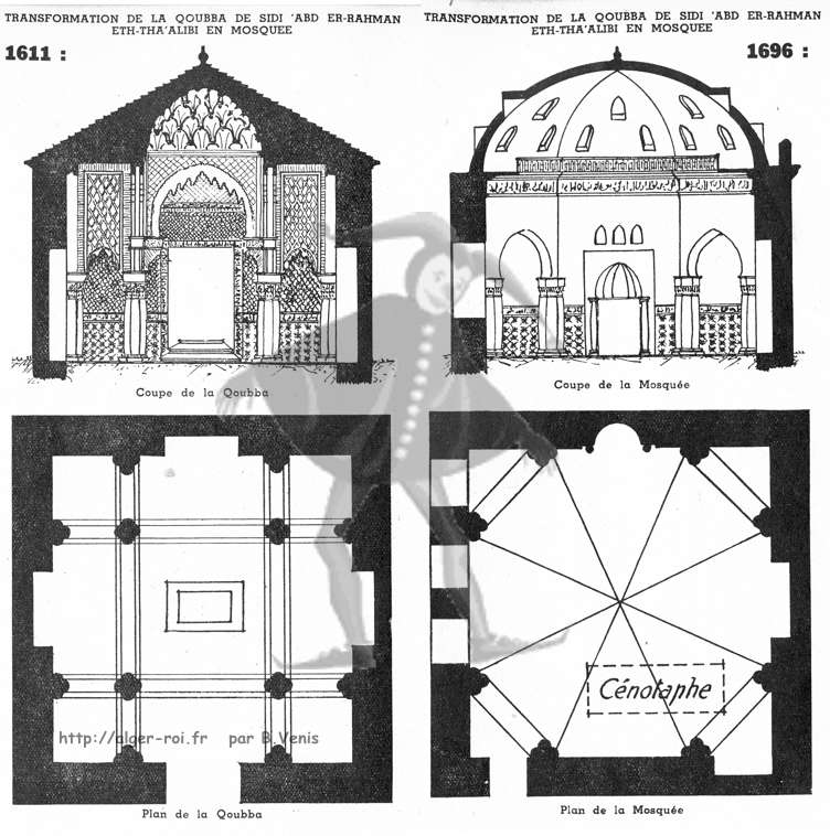 Plan de la Kouba puis de la mosquée de Sidi Abderrahmane (Alger)